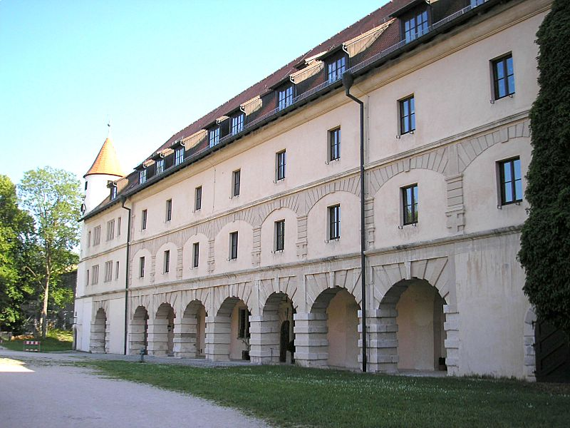 Festung Wülzburg über Weißenburg (Mittelfranken) / Fortress Wuelzburg near Weissenburg, Middle Franconia, Germany. Teil des Schlossbaues im Festungsinneren / Part of the castle inside the fortress. Eigene Aufnahme, Juli 2006 / Own photo, July 2006